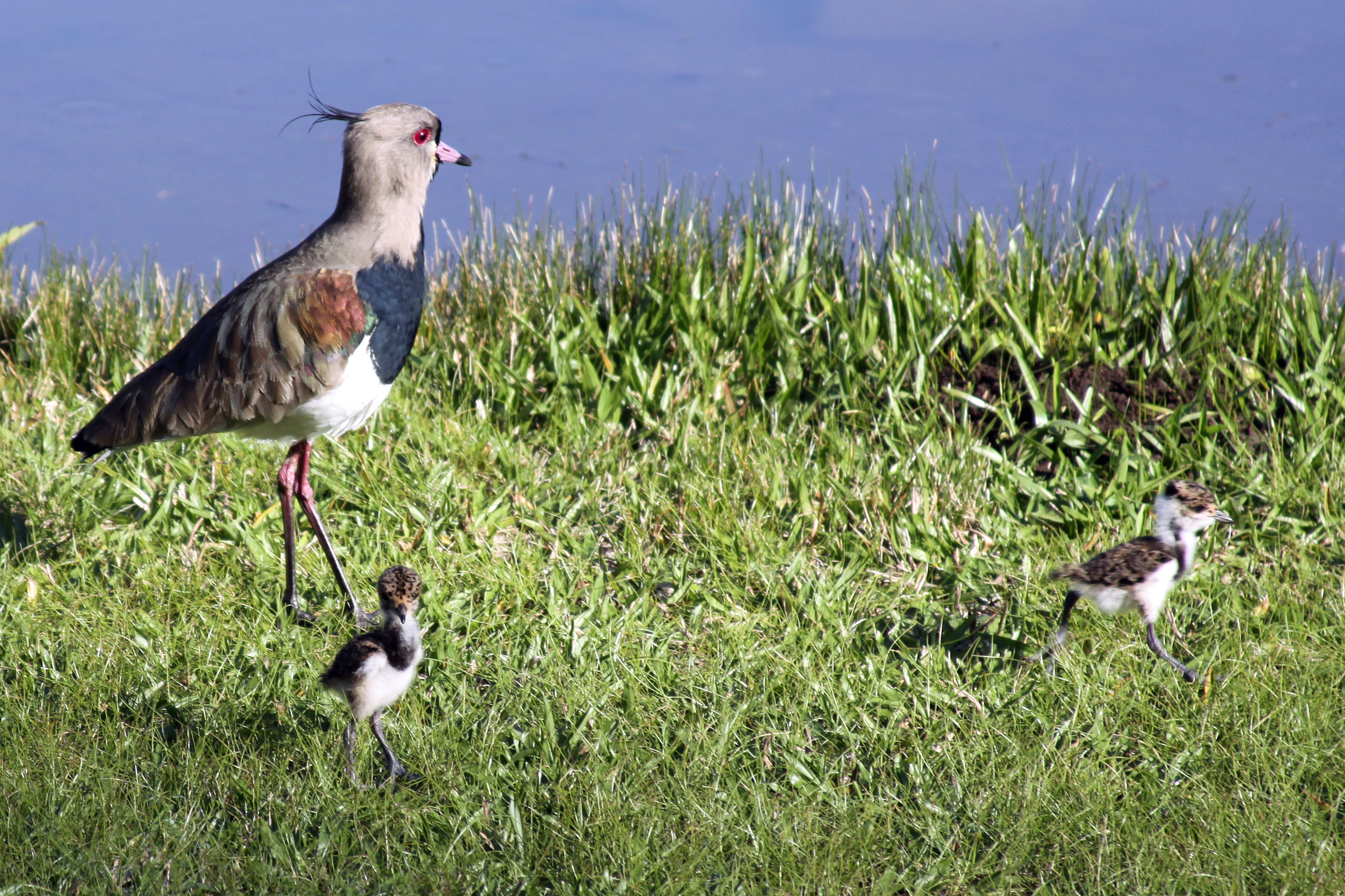 Pássaro Quero Quero (vanellus chilensis) com filhotes.